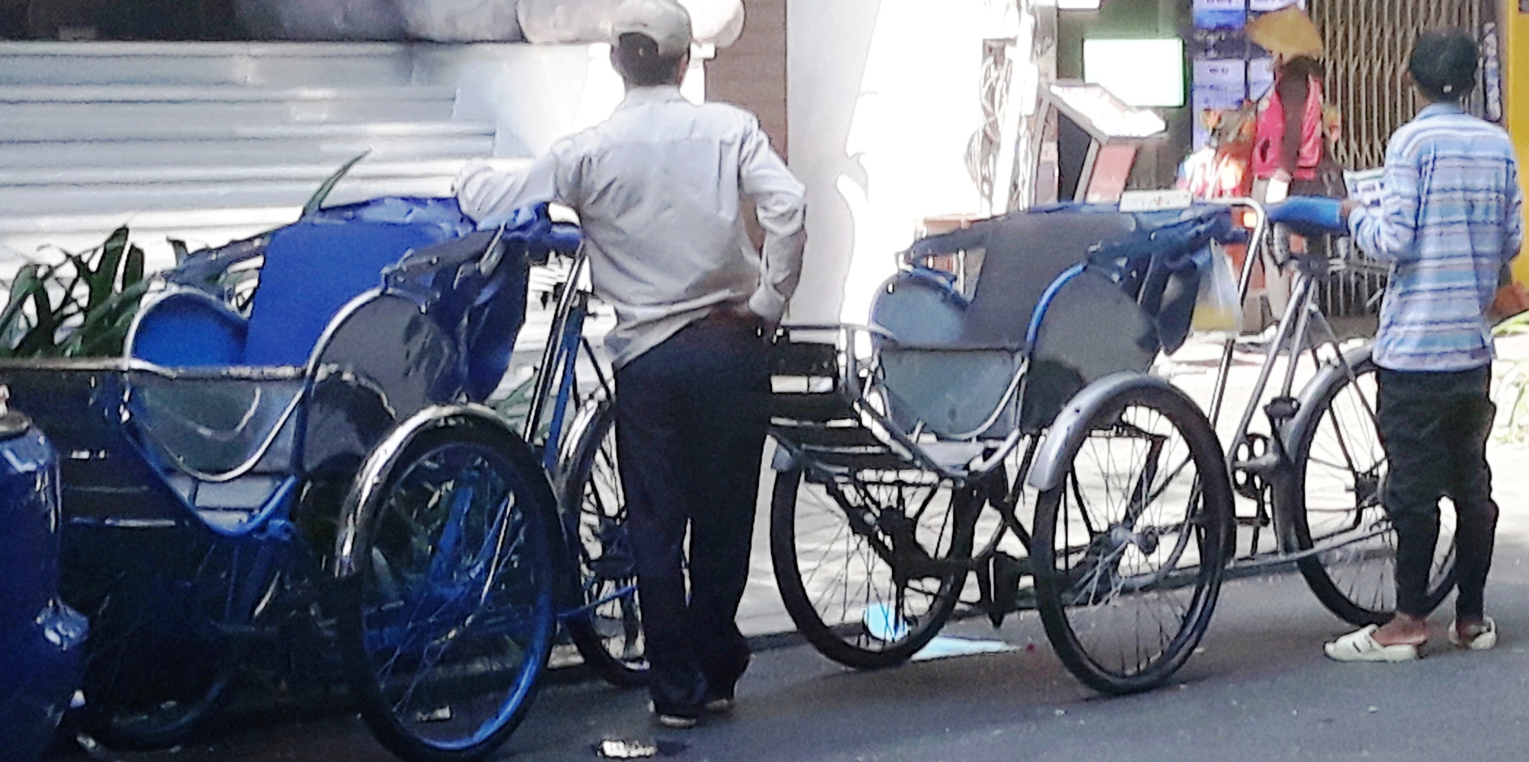 Xich lô 1976